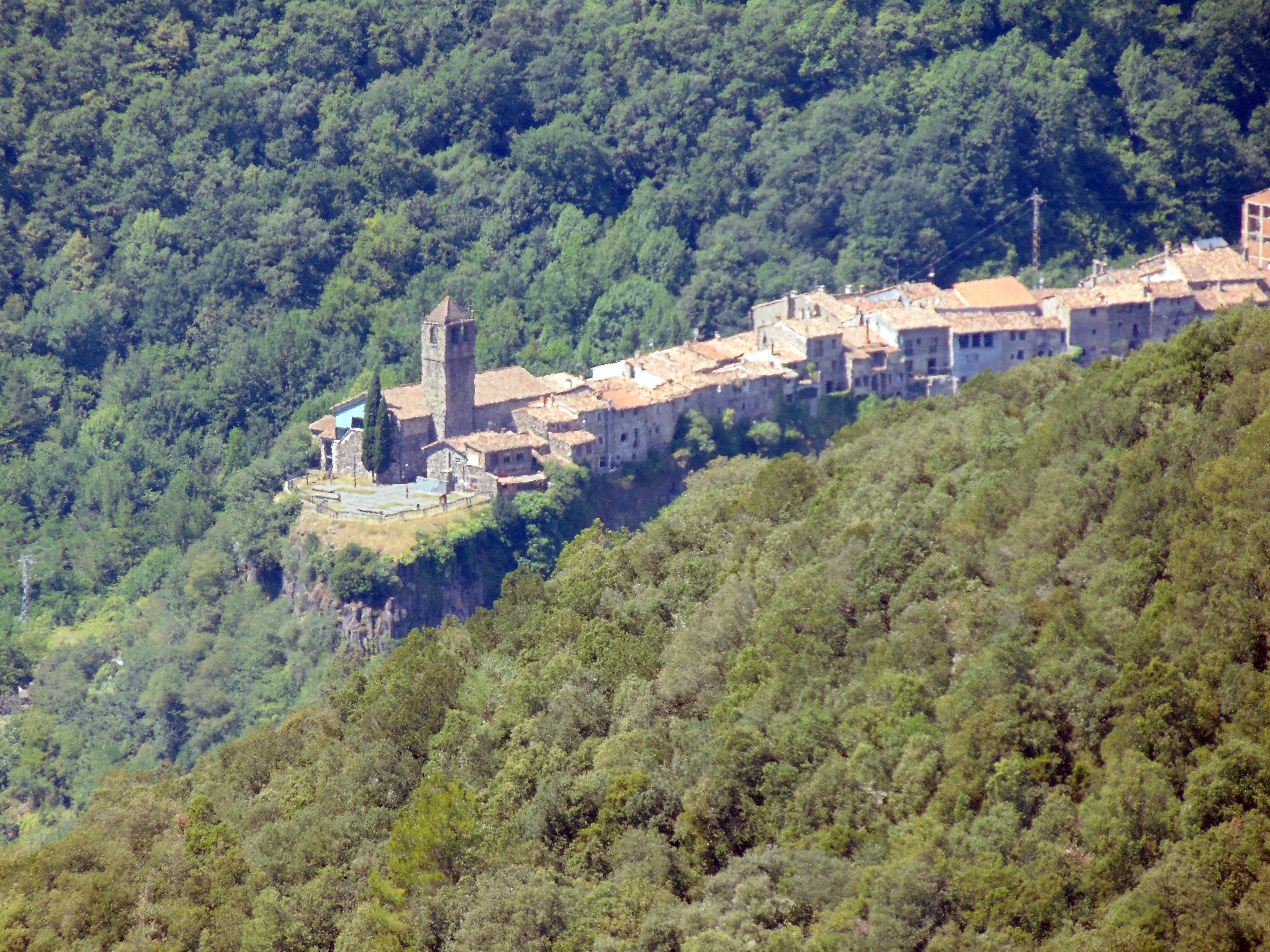 Castell i restes de muralles de Castellfollit (Castellfollit de la Roca i Sant Joan les Fonts)